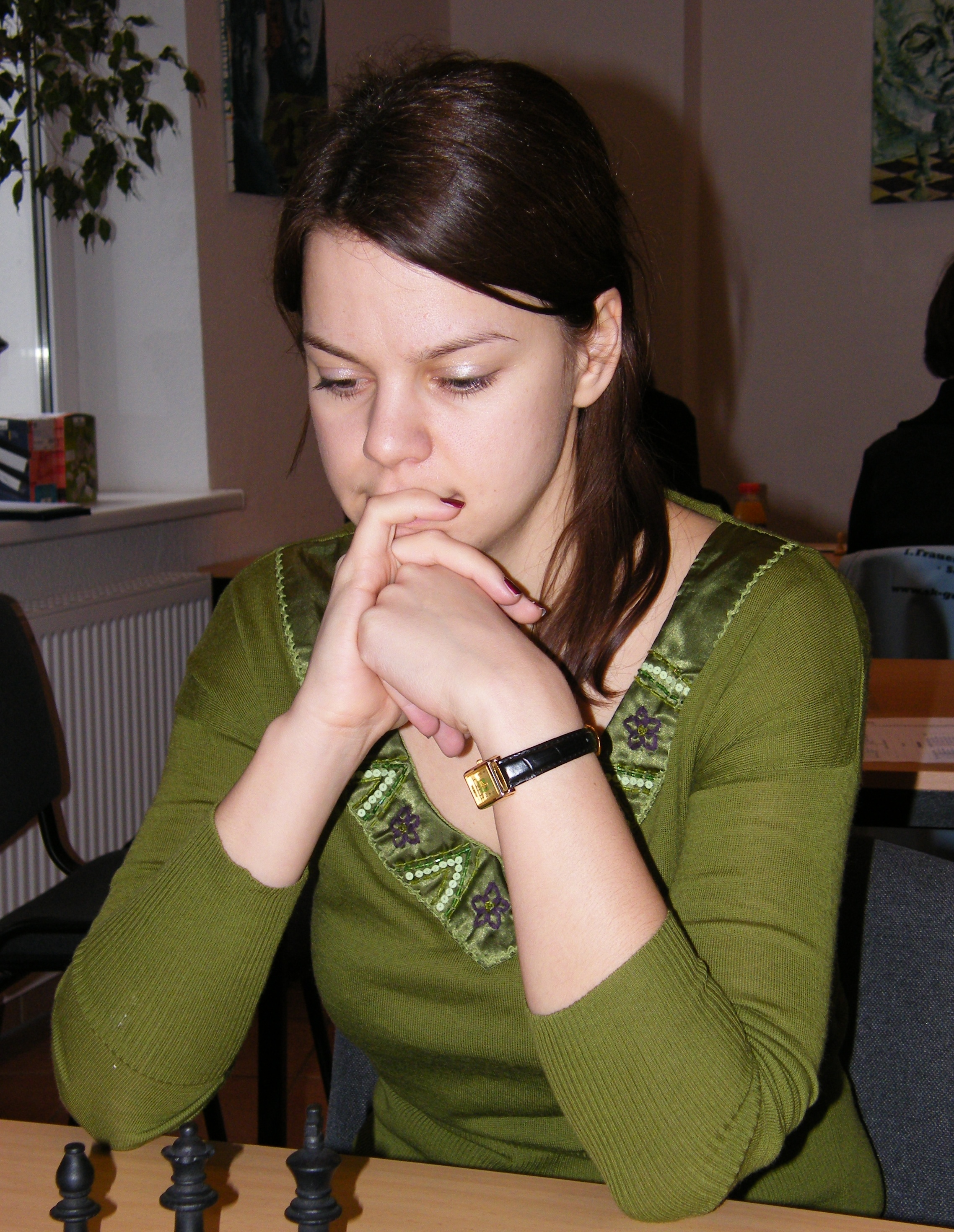 Anastasja Karlowitsch bei der 8. Runde der Frauen-Bundesliga in Berlin